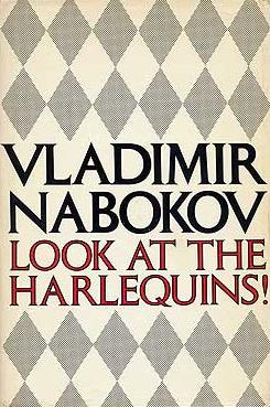 Обложка романа В. В. Набокова "Смотри на арлекинов!", McGraw-Hill, 1969.